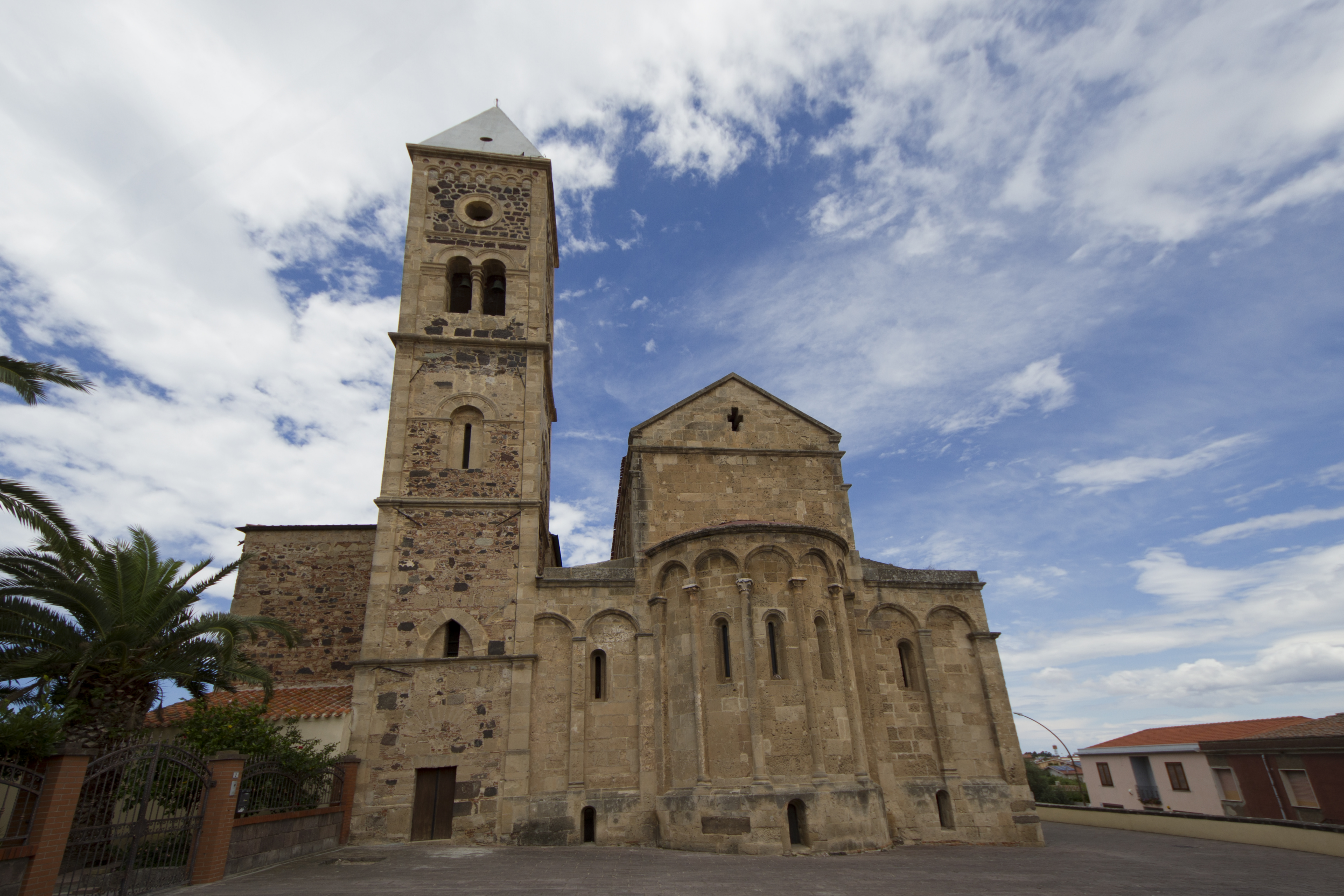 La chiesa di Santa Giusta, Santa Giusta OR, Sardinia, Italy